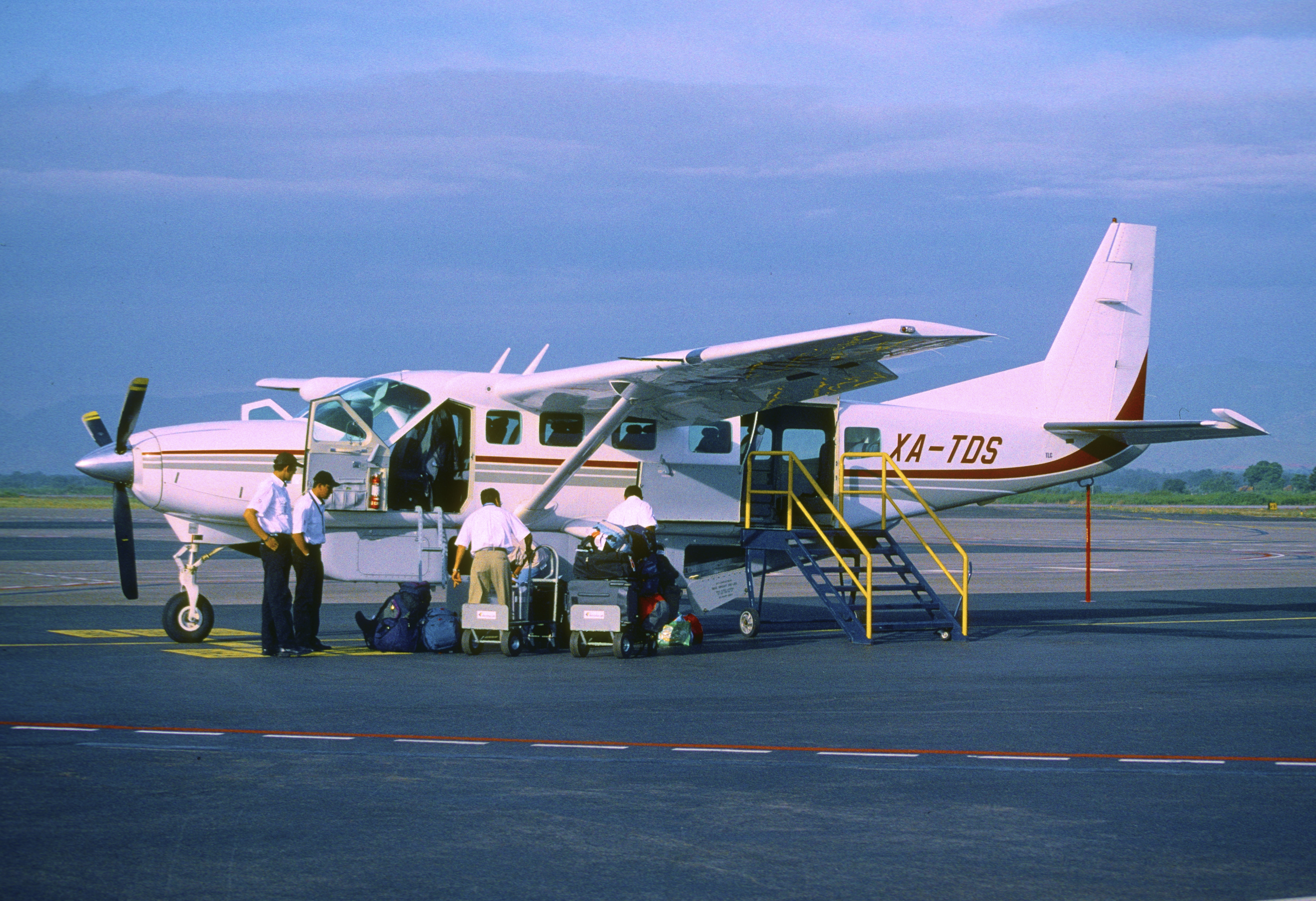 My ride for Puerto Escondido - Oaxaca that day...